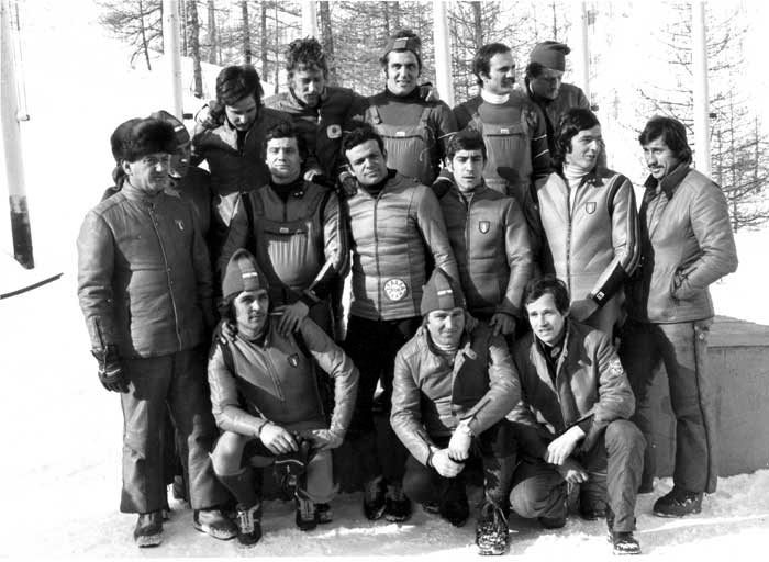 Nazionale italiana di bob (Cervinia 1974) - 1